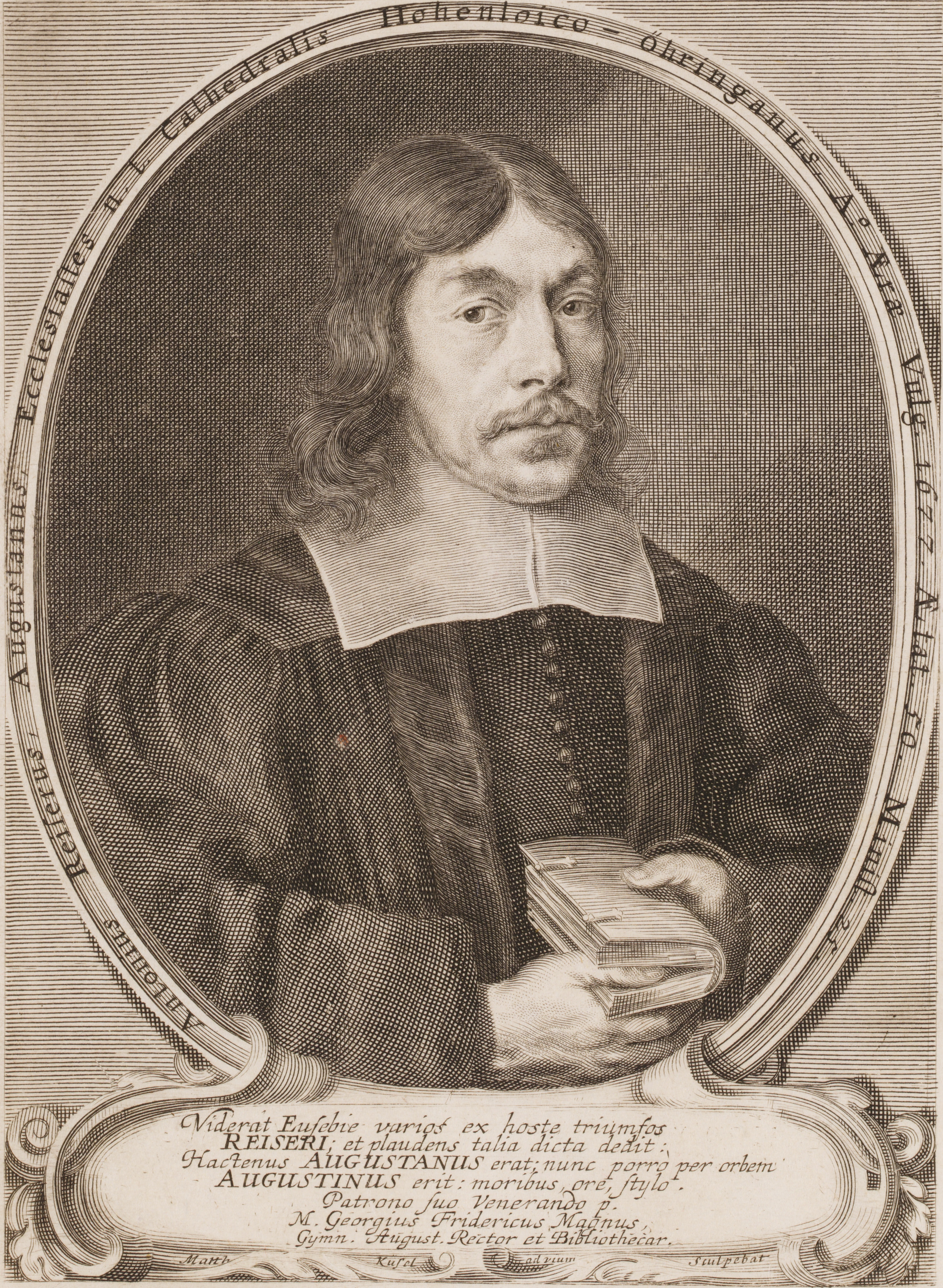 Bildnis von Anton Reiser